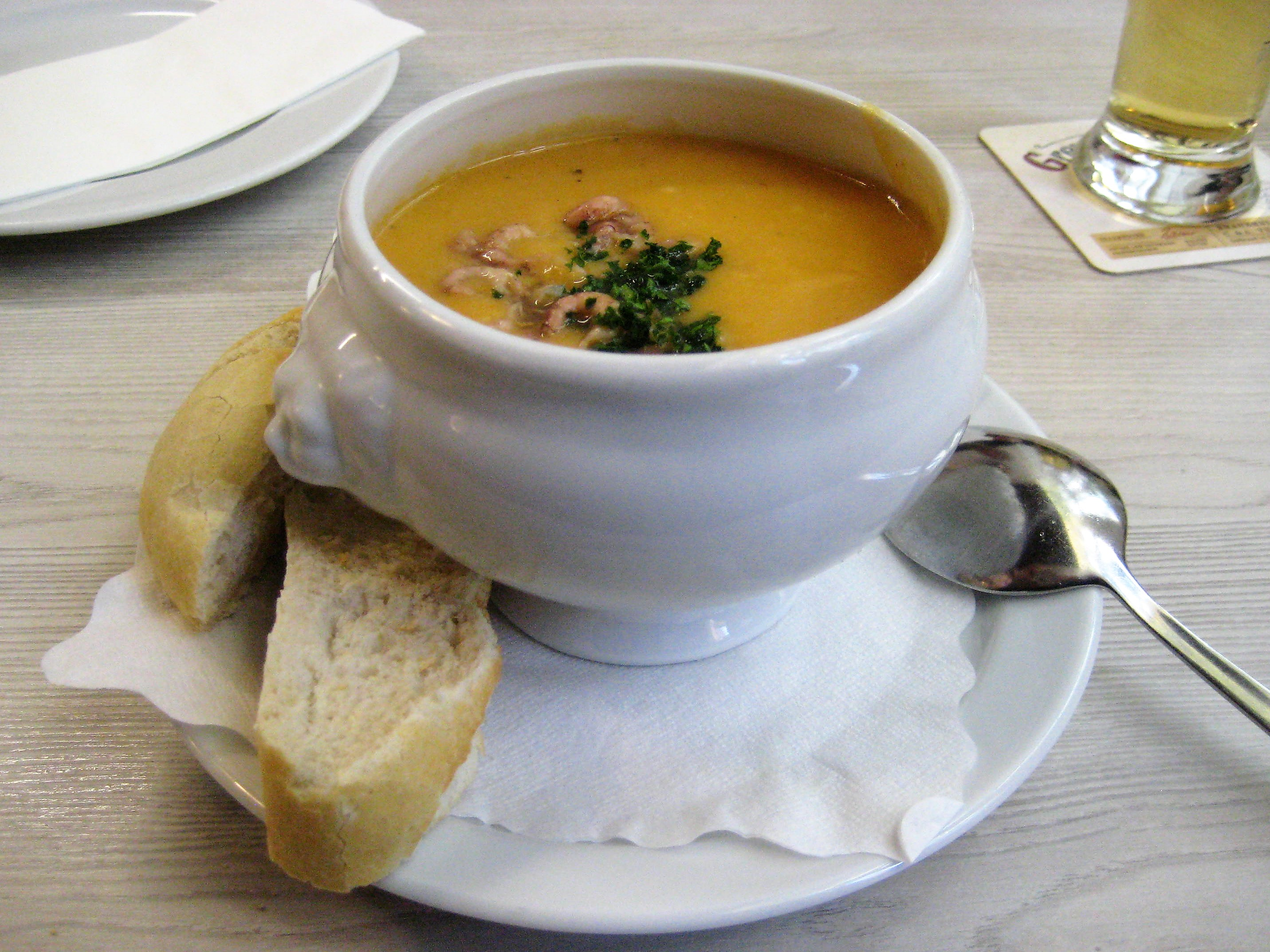 Bremer Krabbensuppe, klassisch zubereitet, mit frischen Nordseekrabben und gehackter Petersilie sowie mit Baguette; hier im „ältesten Fischrestaurant Bremens“, dem Restaurant „Knurrhahn“ in Bremen, Deutschland.